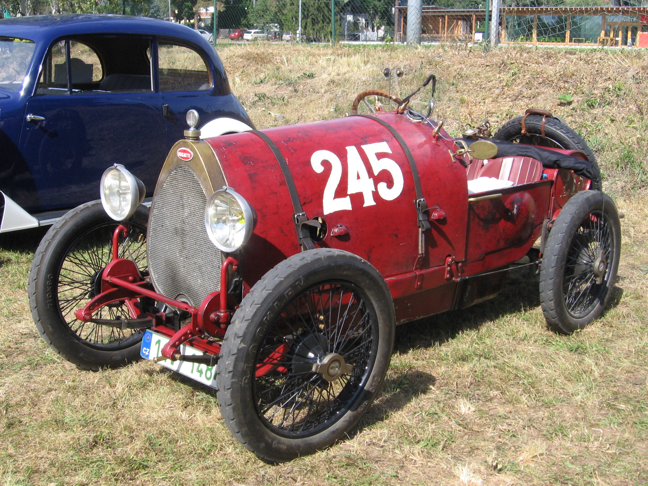 Bugatti typ 13 na Jílovišti